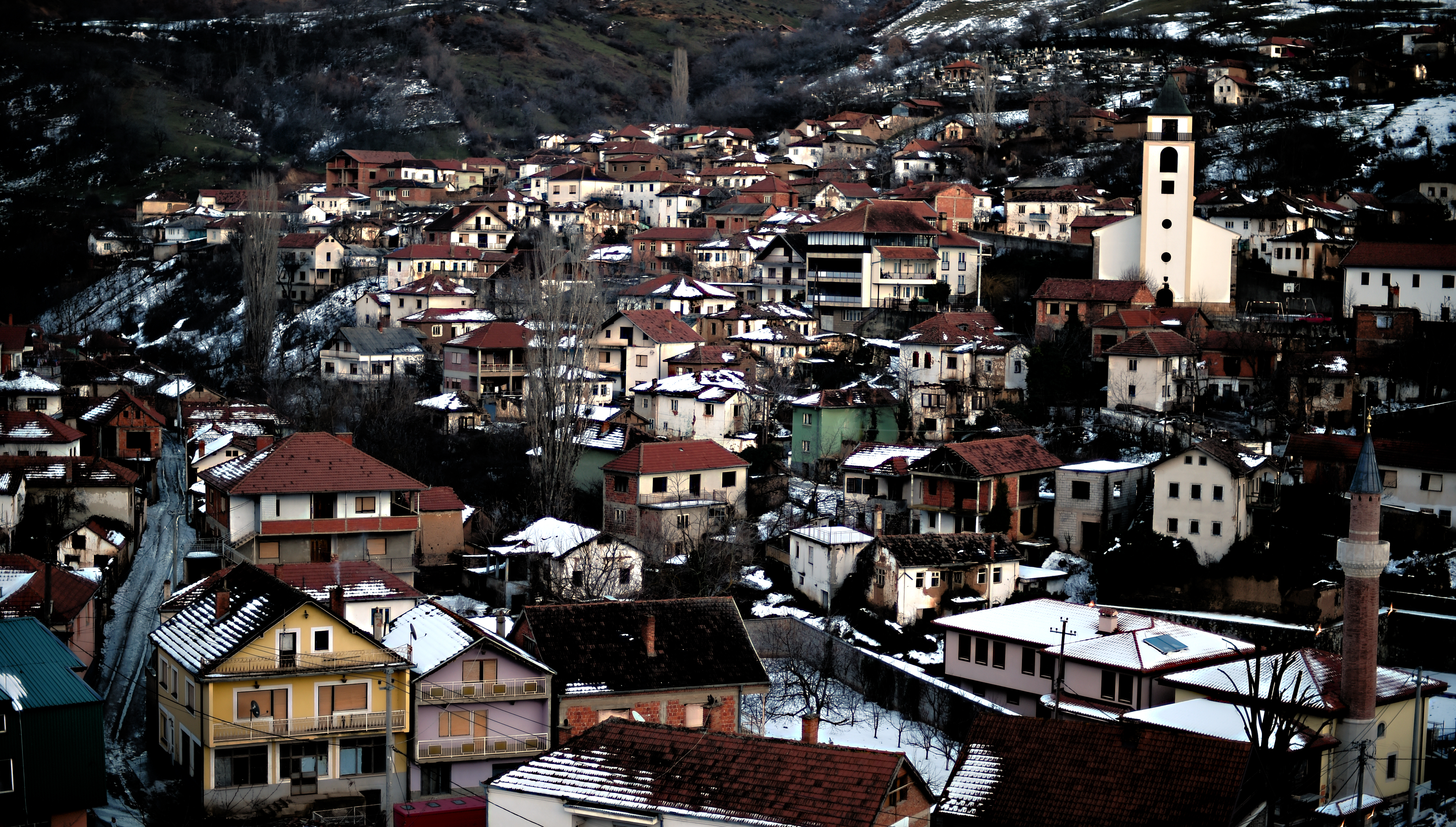 Gjurmët e Gjytetit të Janjevës